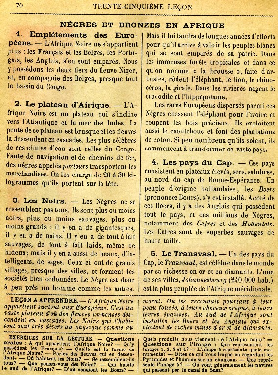 Extrait de "La Géographie vivante" d’Onésime Reclus. Cours préparatoire et CM1. Première parution en 1926